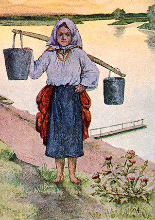 Романова Ольга Александровна. Девушка с коромыслом.